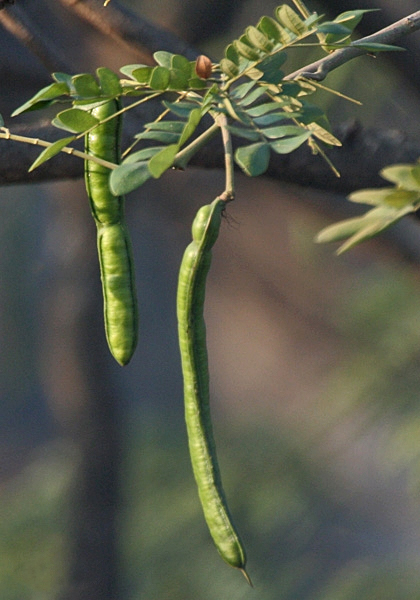 Vilaiti Siris Samanea saman in Kolkata, West Bengal, India.